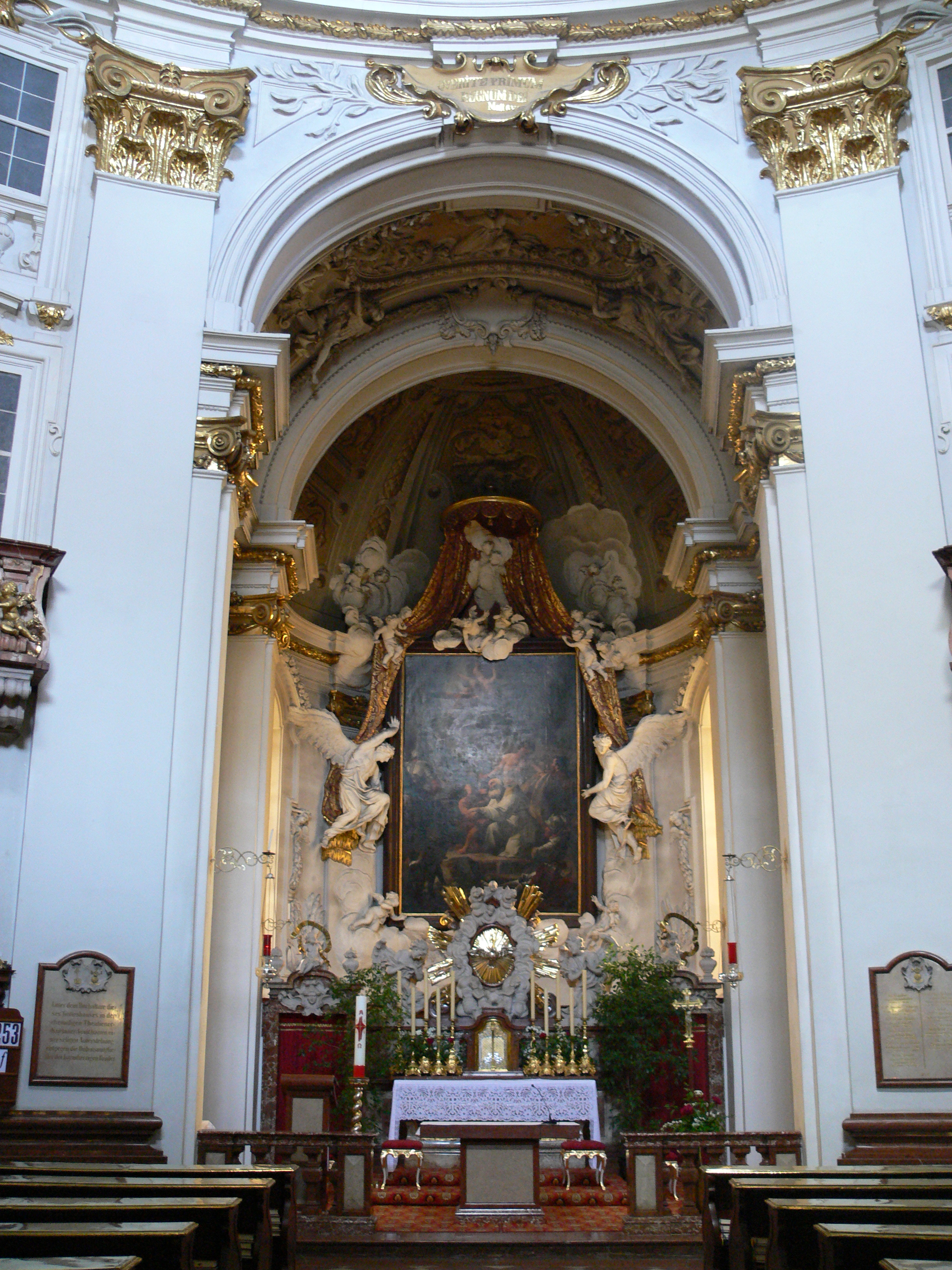 Tabernakelaufsatz mit Engeln von Matthias Wilhelm Weißenkirchner; Altarblatt von Paul Troger (1727)